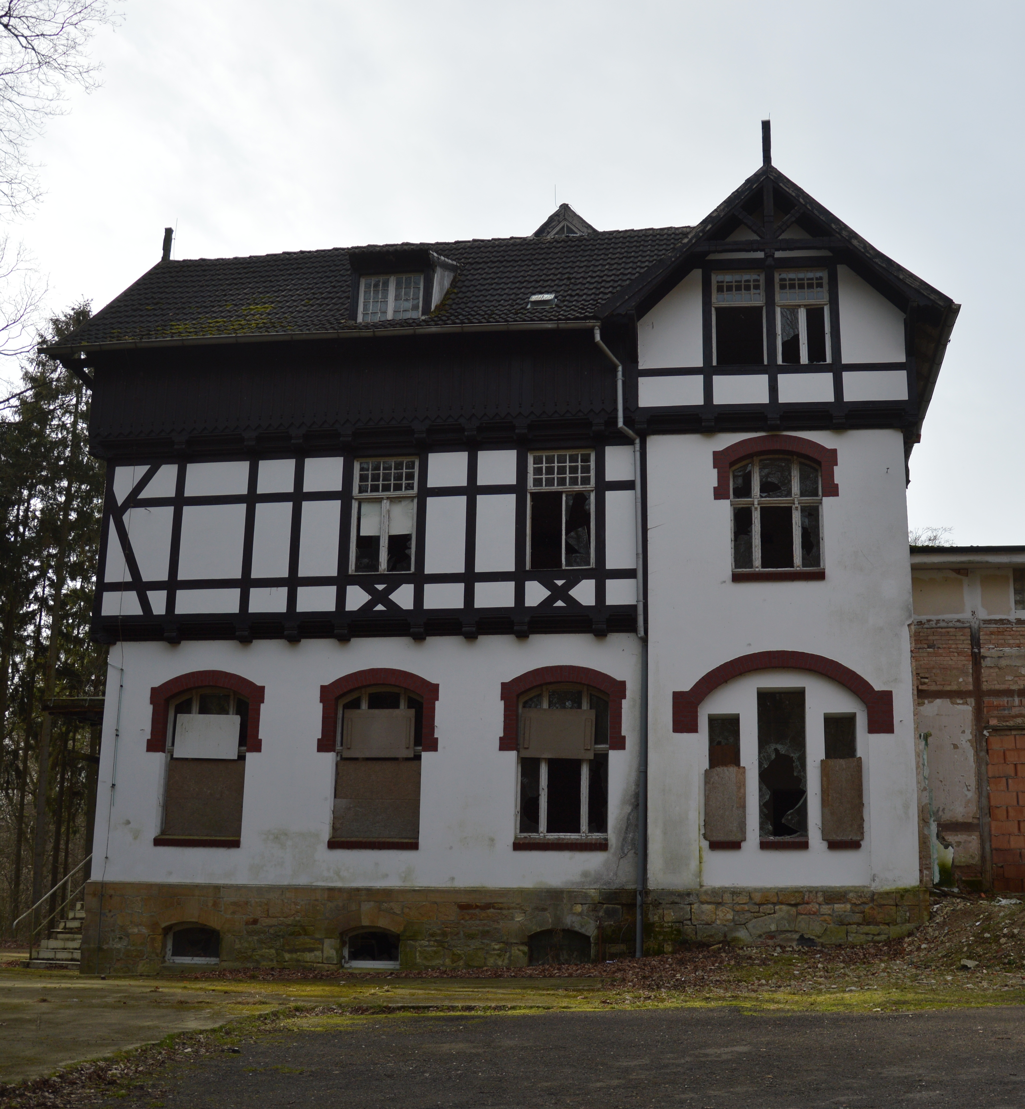 Hubertushöhe